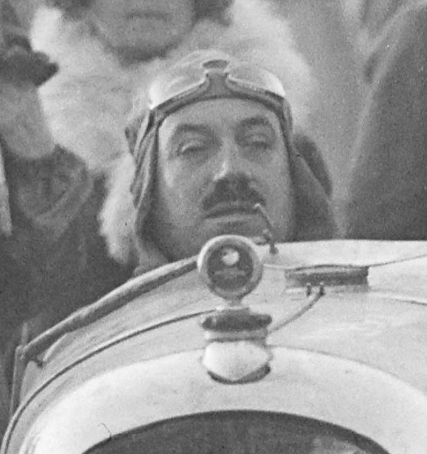 André Morel en 1929, au Grand prix de Boulogne des cyclecars (équipe Amilcar).